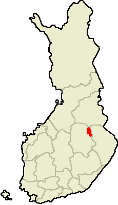 Own work